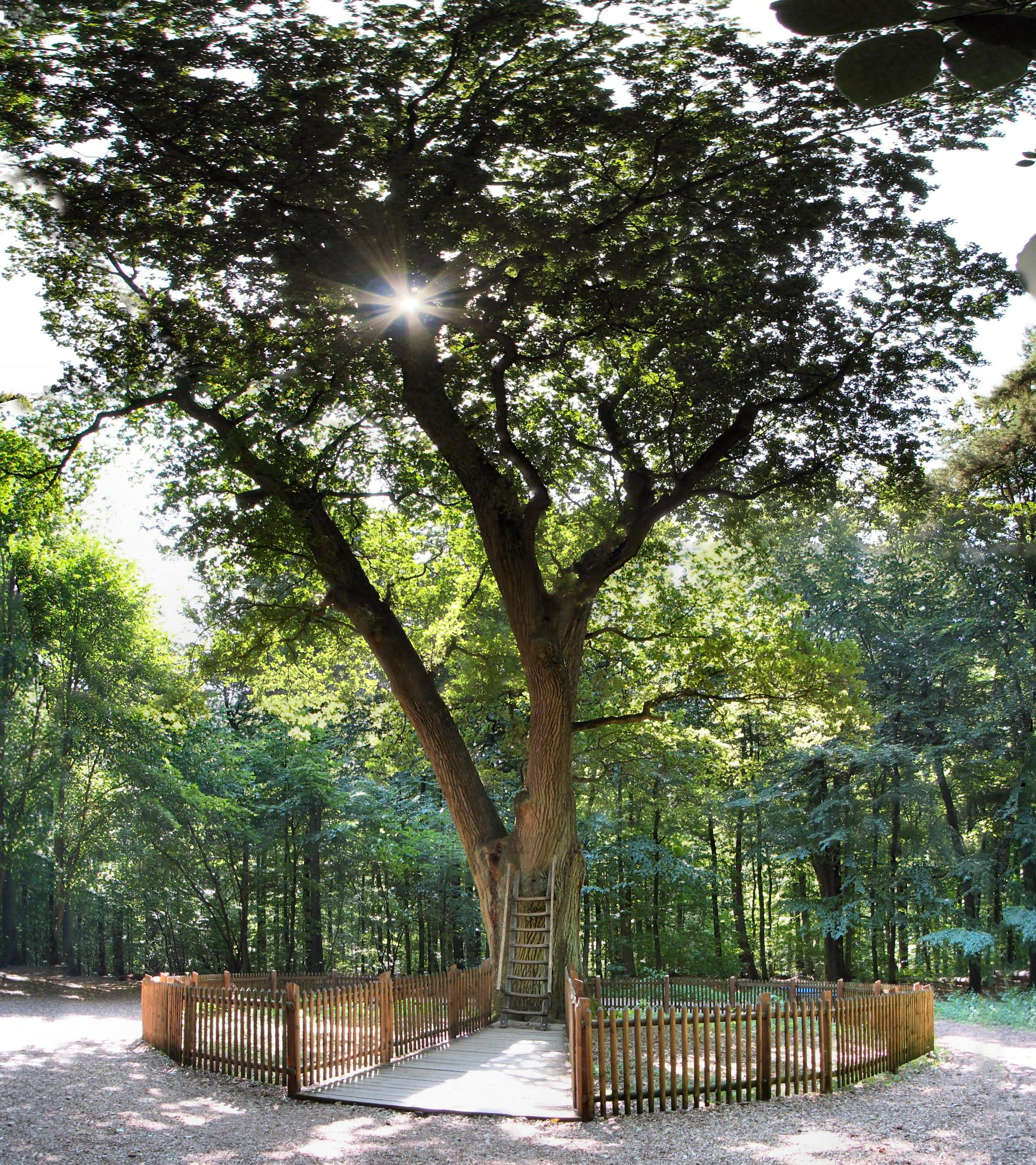 Braeutigamseiche im Dodauer Forst bei Eutin, Deutschland / Bridegrooms-Oak near Eutin, Germany